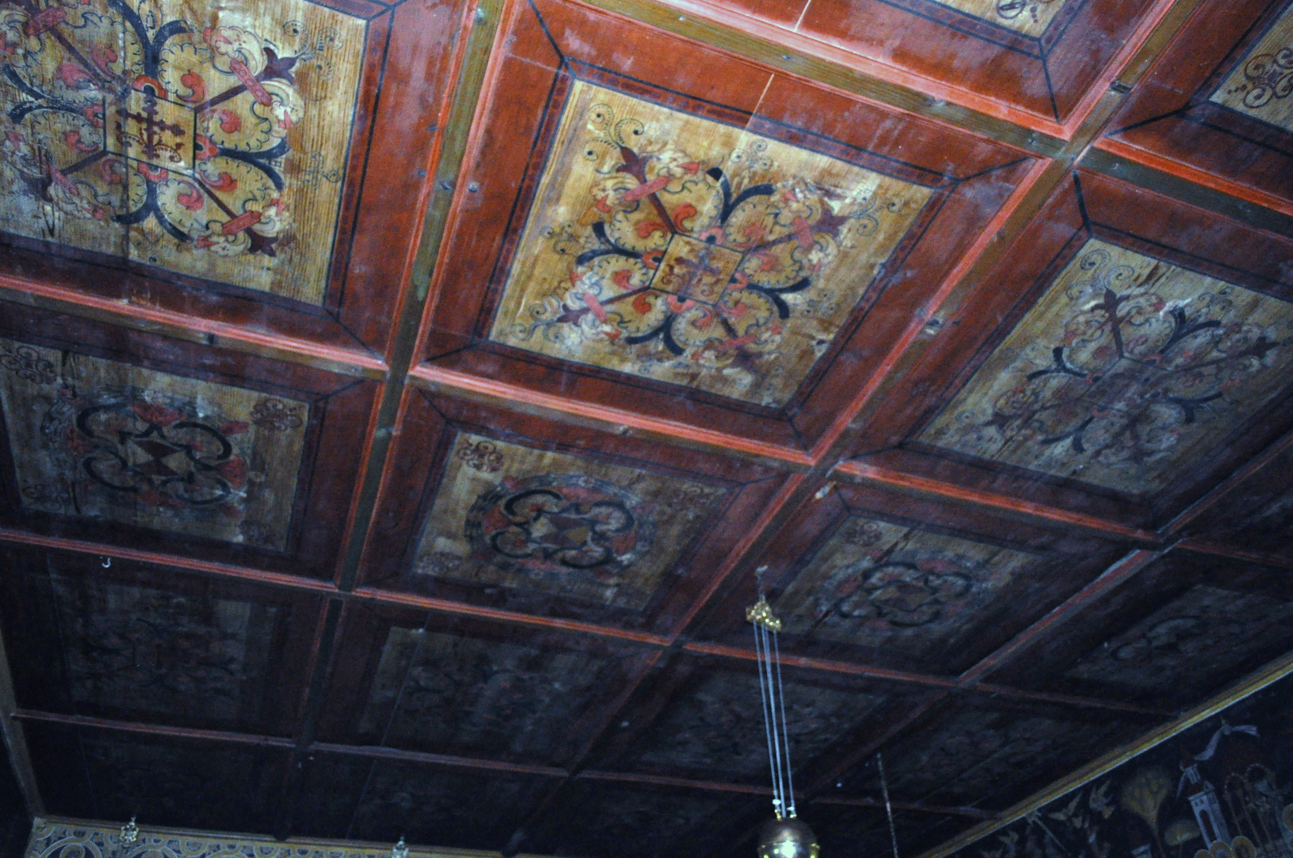 Biserica de lemn "Sf. Nicolae" a mănăstirii Lupşa, sat VALEA LUPŞII; comuna LUPŞA